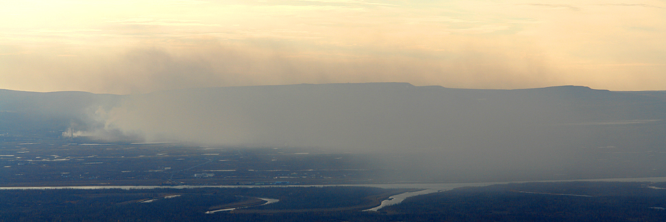 Впадение Валька в Норильскую